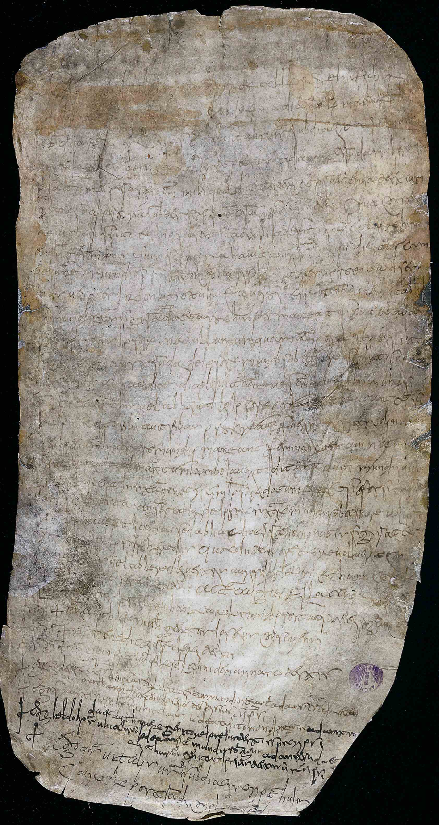 Archivio di Stato di Milano, Museo Diplomatico. Atto notarile in corsiva longobarda datato 12 maggio 721 riguardo il “pagamento di mundio per il matrimonio di Anstruda con un servo”, in lingua latina